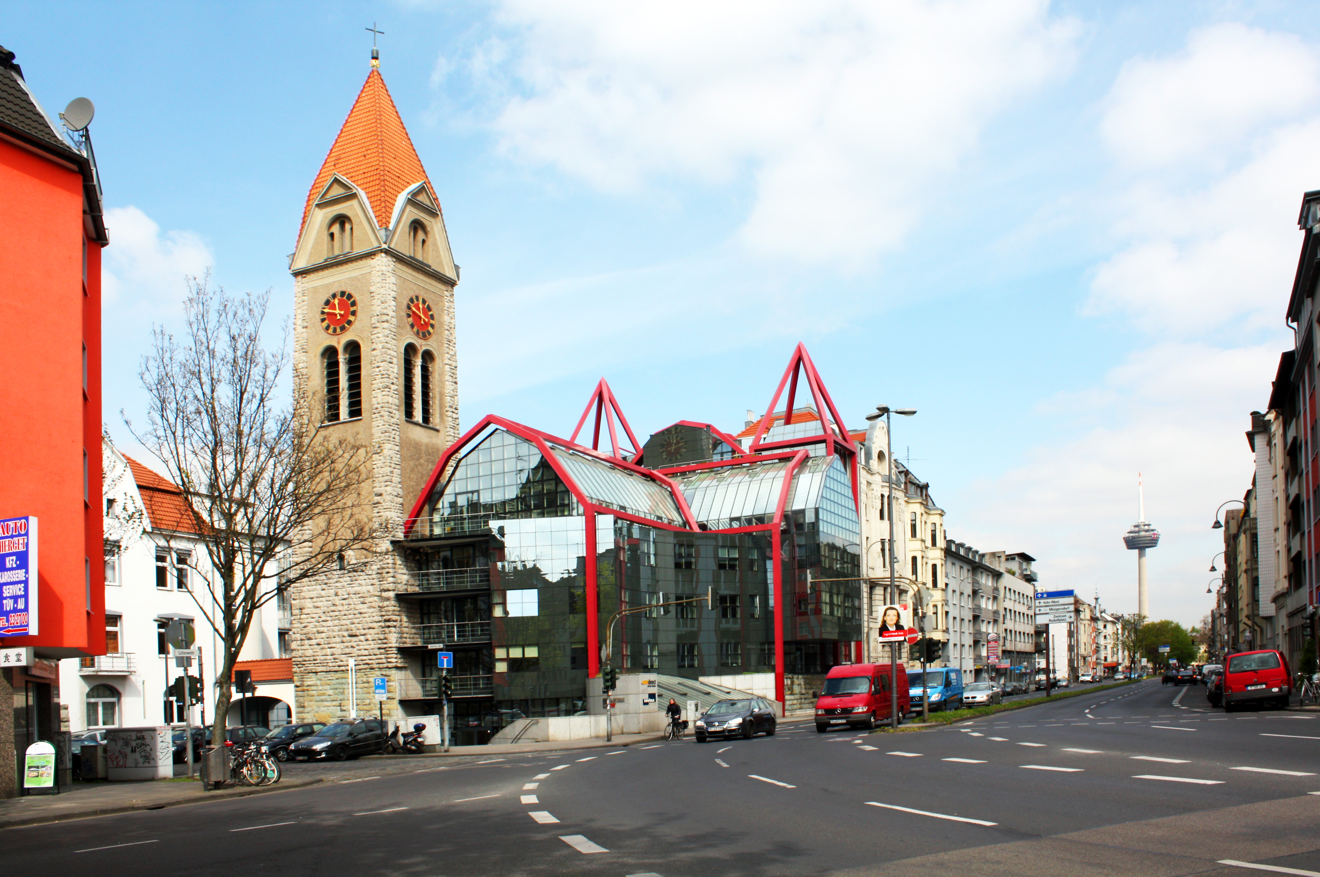 Alt-Katholische Pfarrkirche Christi Auferstehung Köln. Die Kirche gehört zum Dekanat Nordrhein-Westfalen der Altkatholischen Kirche in Deutschland. This is a photograph of an architectural monument.